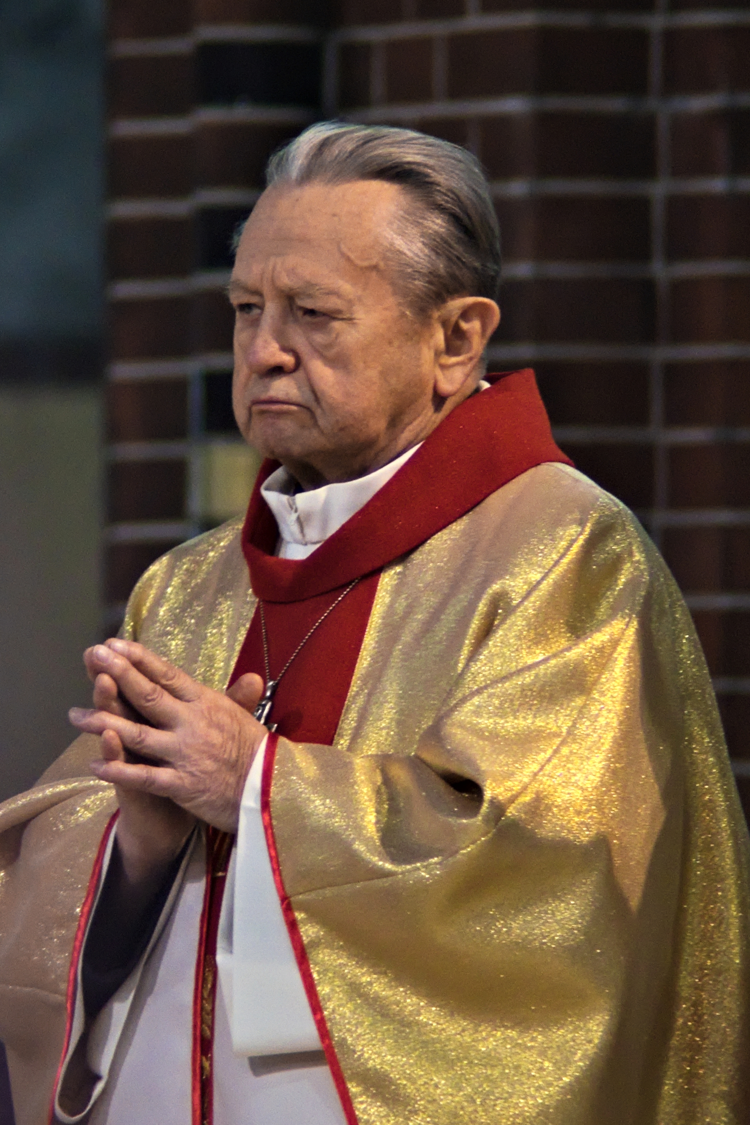 Gerard Kusz (1939– ) biskup pomocniczy senior diecezji gliwickiej na uroczystej mszy świętej, podczas której świętowano 85. rocznicę urodzin biskupa seniora Jana Wieczorka w katedrze Świętych Apostołów Piotra i Pawła w Gliwicach